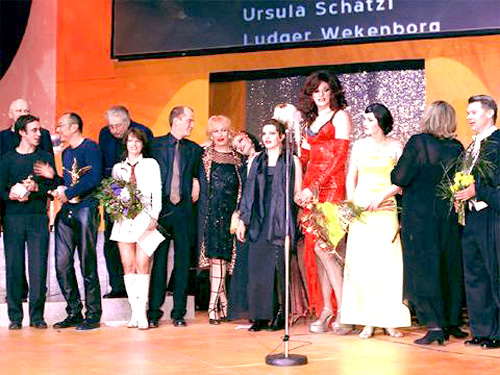 Teddy Award Filmpreisverleihung (Berlinale) erstmals im Tempodrom Berlin, Februar 2002. War Co-Produzent und Dekorateur!